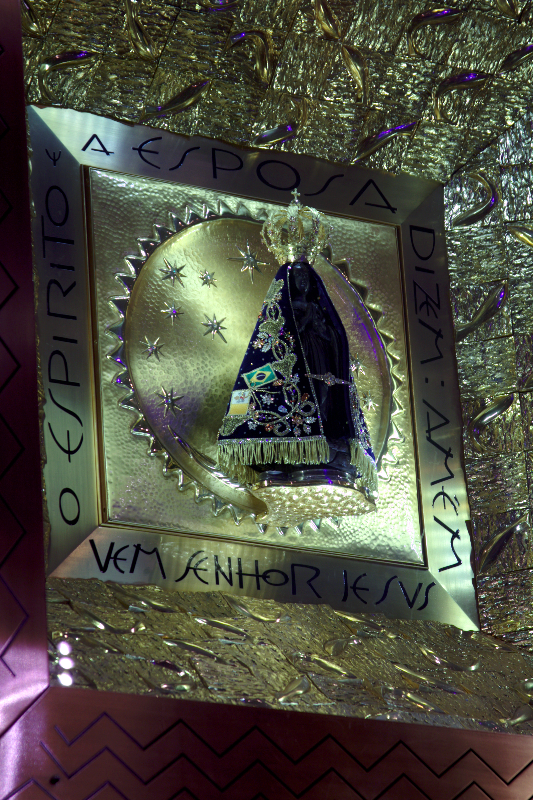 Basilica of Aparecida